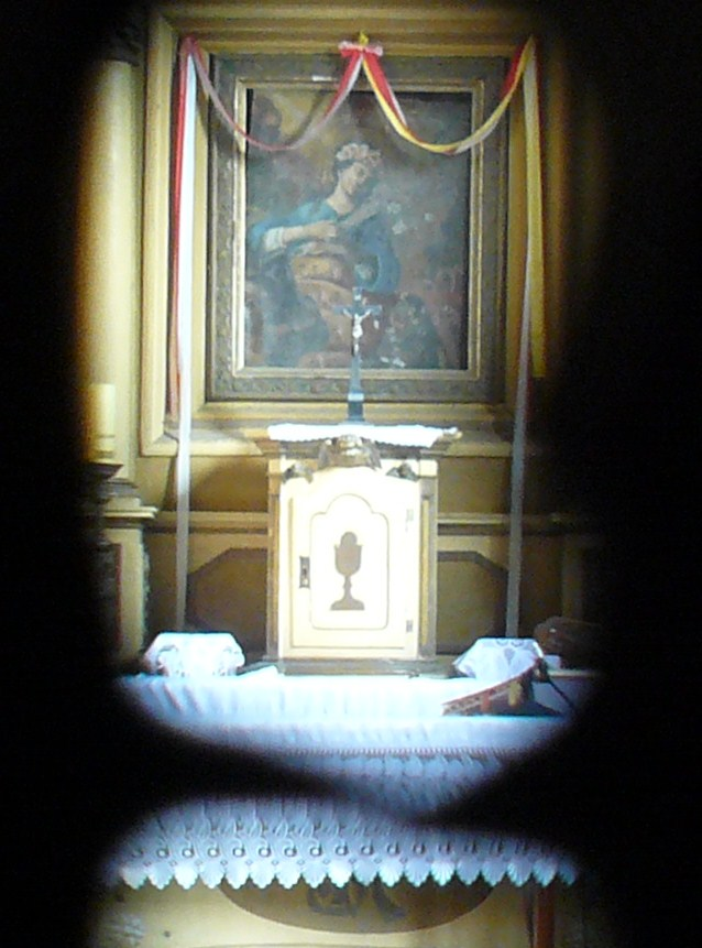 Sławno - obraz św. Rozalii w drewnianej kaplicy cmentarnej